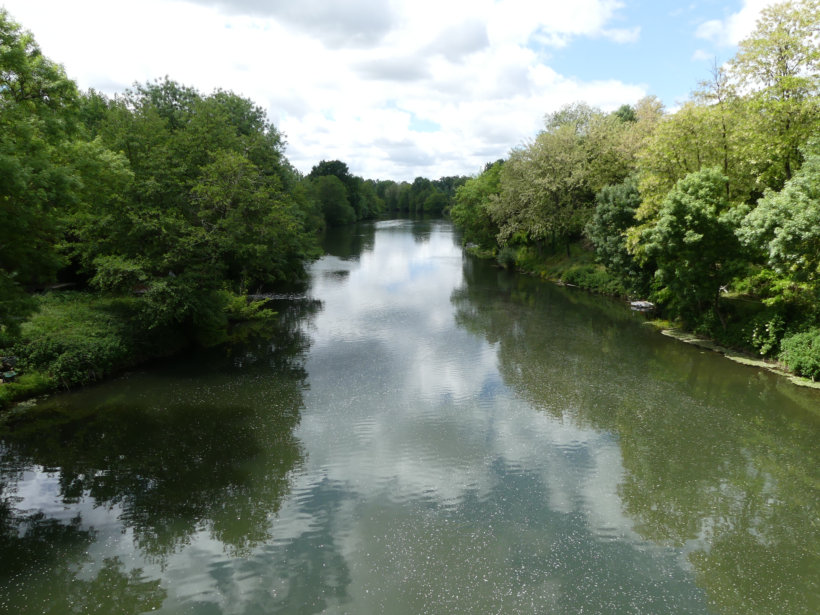 L'Isle en aval du pont de la route départementale 121, entre Gours (à gauche) et Saint-Antoine-sur-l'Isle (à droite), Gironde, France.